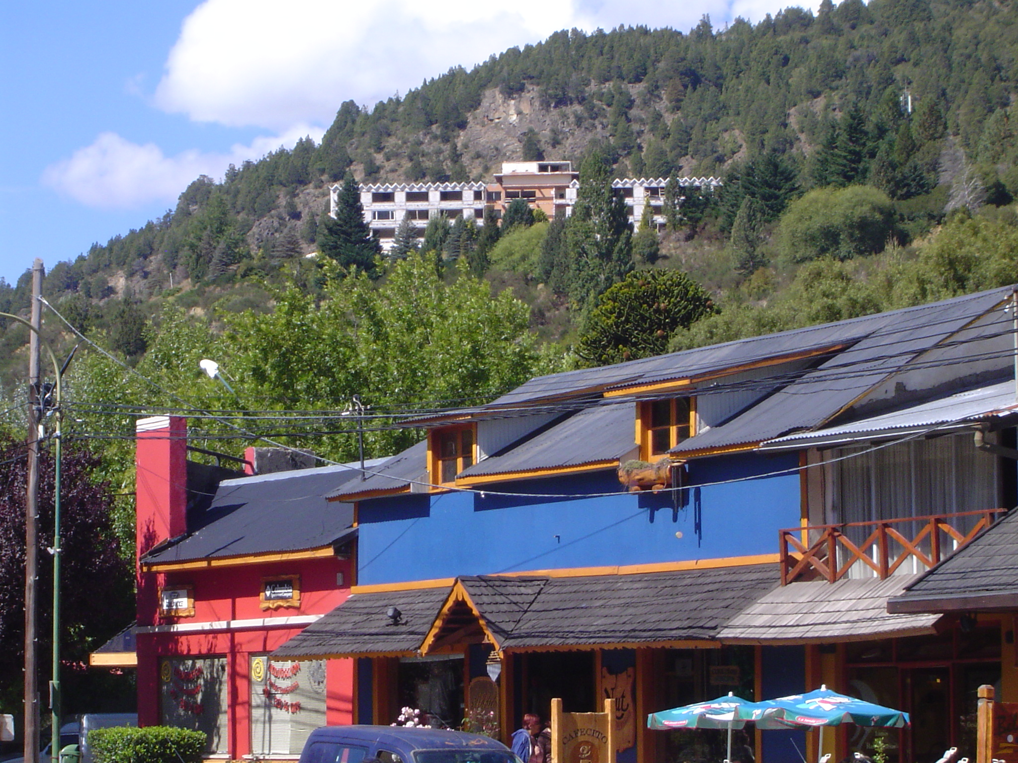 El ex Hotel del Sol de San Martín de los Andes. A marzo de 2007 en obras de refacción y remodelación. Construído en la década de 1970.